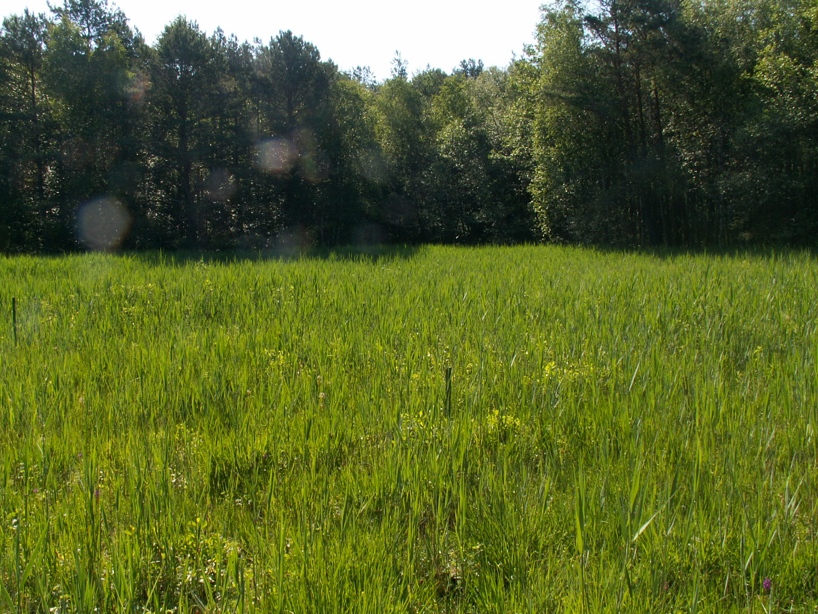 Feuchtwiese auf Kalkflachmoor im NSG „Quaßliner Moor“ (Mecklenburg-Vorpommern), Standort von Swertia perennis und Dactylorhiza majalis ssp. brevifolia